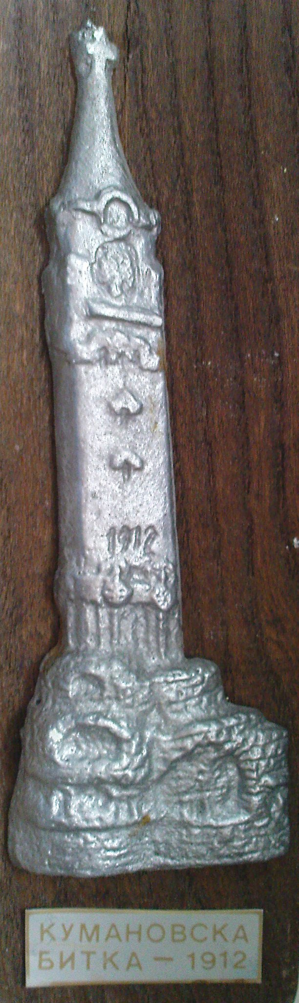 првобитни зебрњак